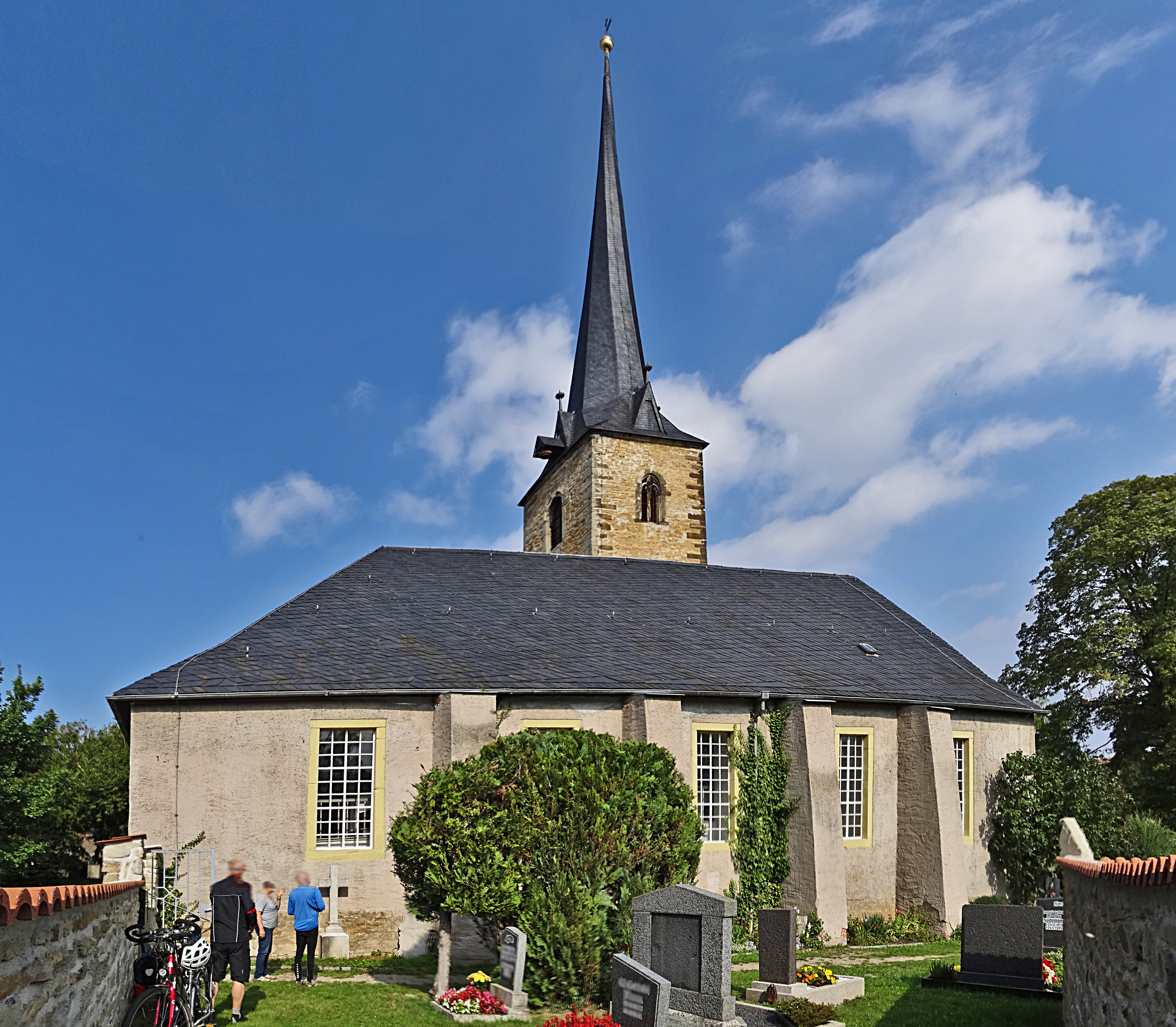 Kirche St. Johannes in Neumark bei Weimar